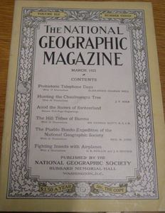 National Geographic , 1922, couverture : "Hunting the chaumlmoogra tree", JF Rock